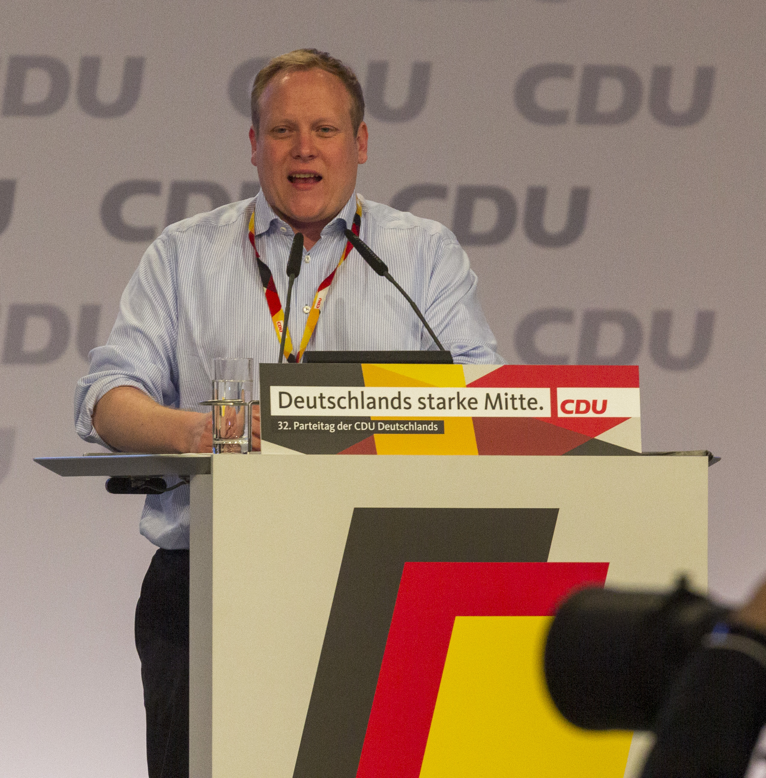 Tilman Kuban (Bundesvorsitzender der Jungen Union auf dem CDU Parteitag 2019 in Leipzig.